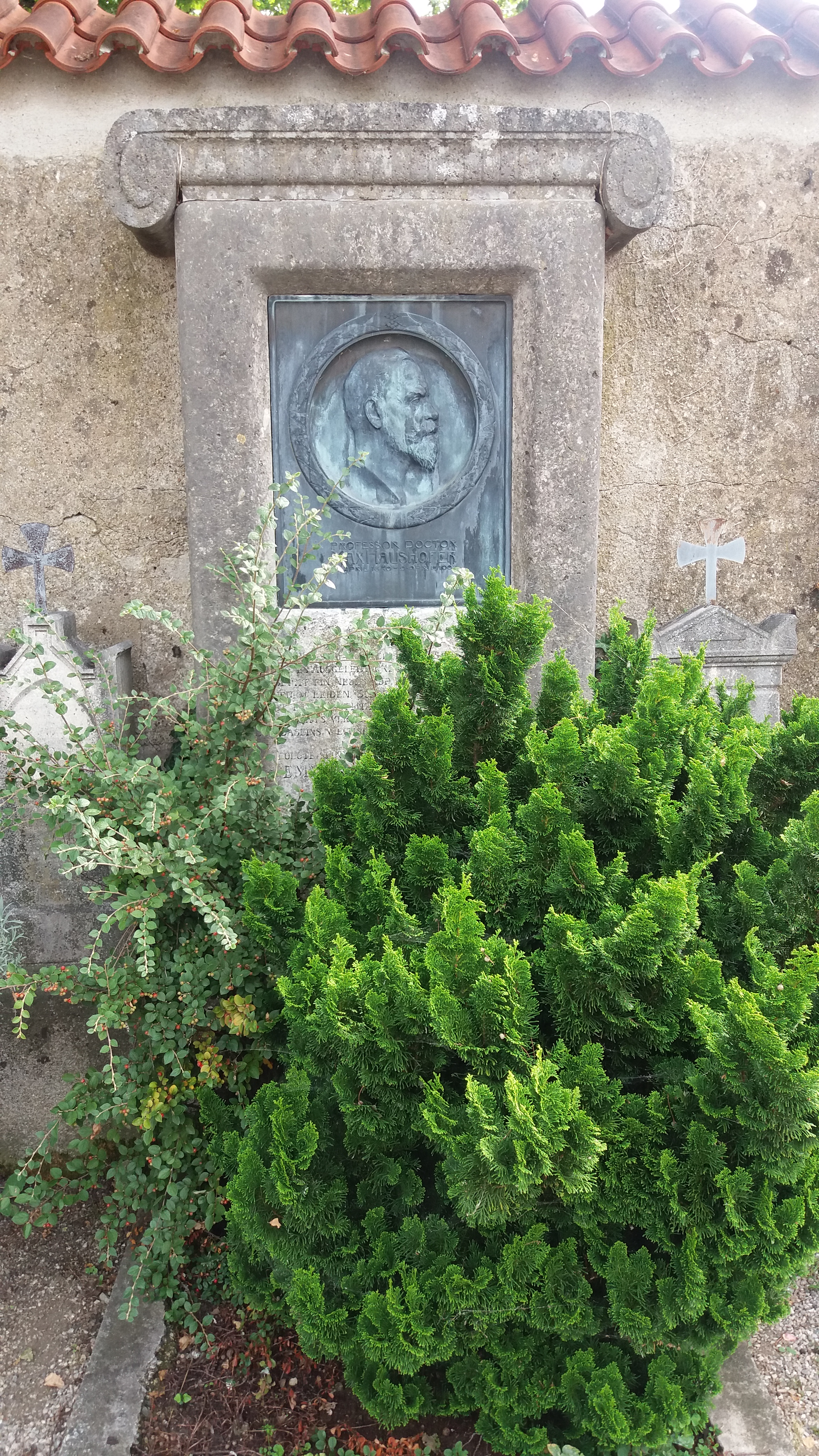 Grabstätte Max Haushofer Jun. auf dem Inselfriedhof Frauenchiemsee